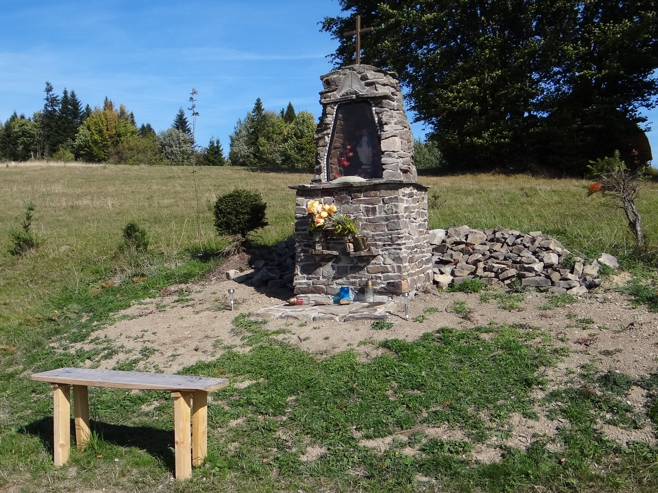 Kapliczka na stokach Abrahamowa (od strony Żabnicy)